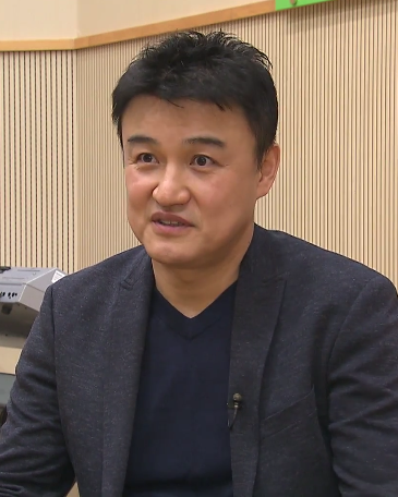 라디오 DJ 데뷔 후 인터뷰를 하는 박중훈.